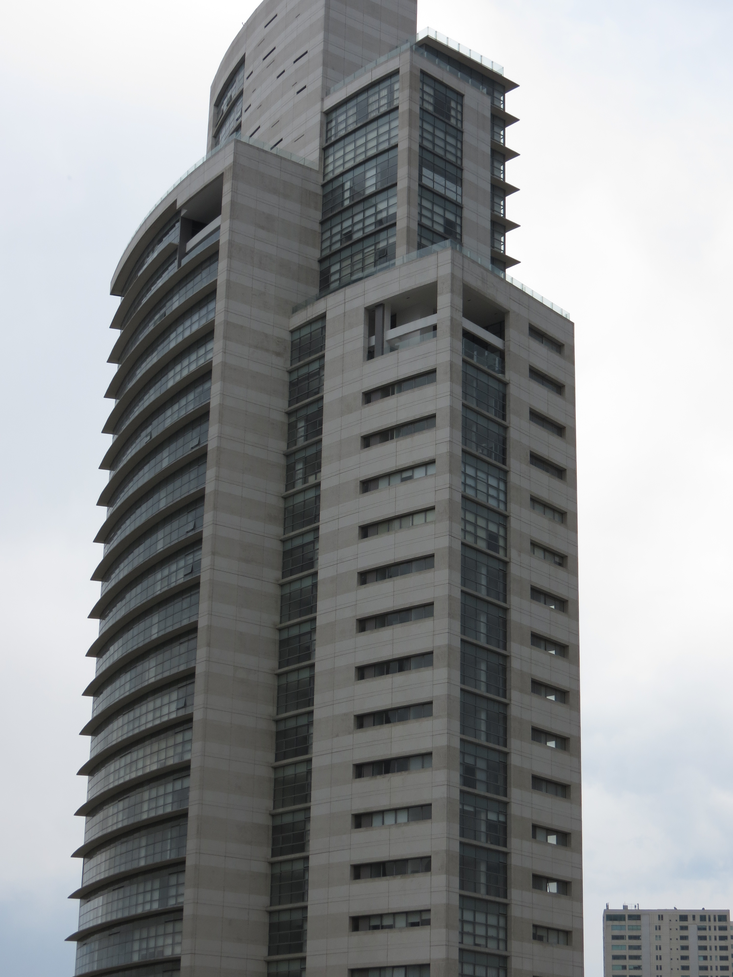 Torre Milán